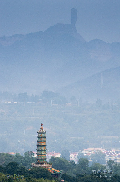 中文（中国大陆）: 须弥福寿寺中的万寿塔和隐约雾后的棒槌山